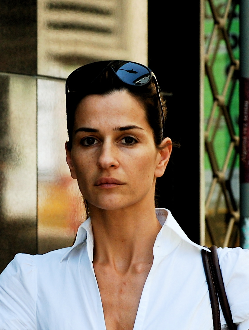 Sofia Aparício